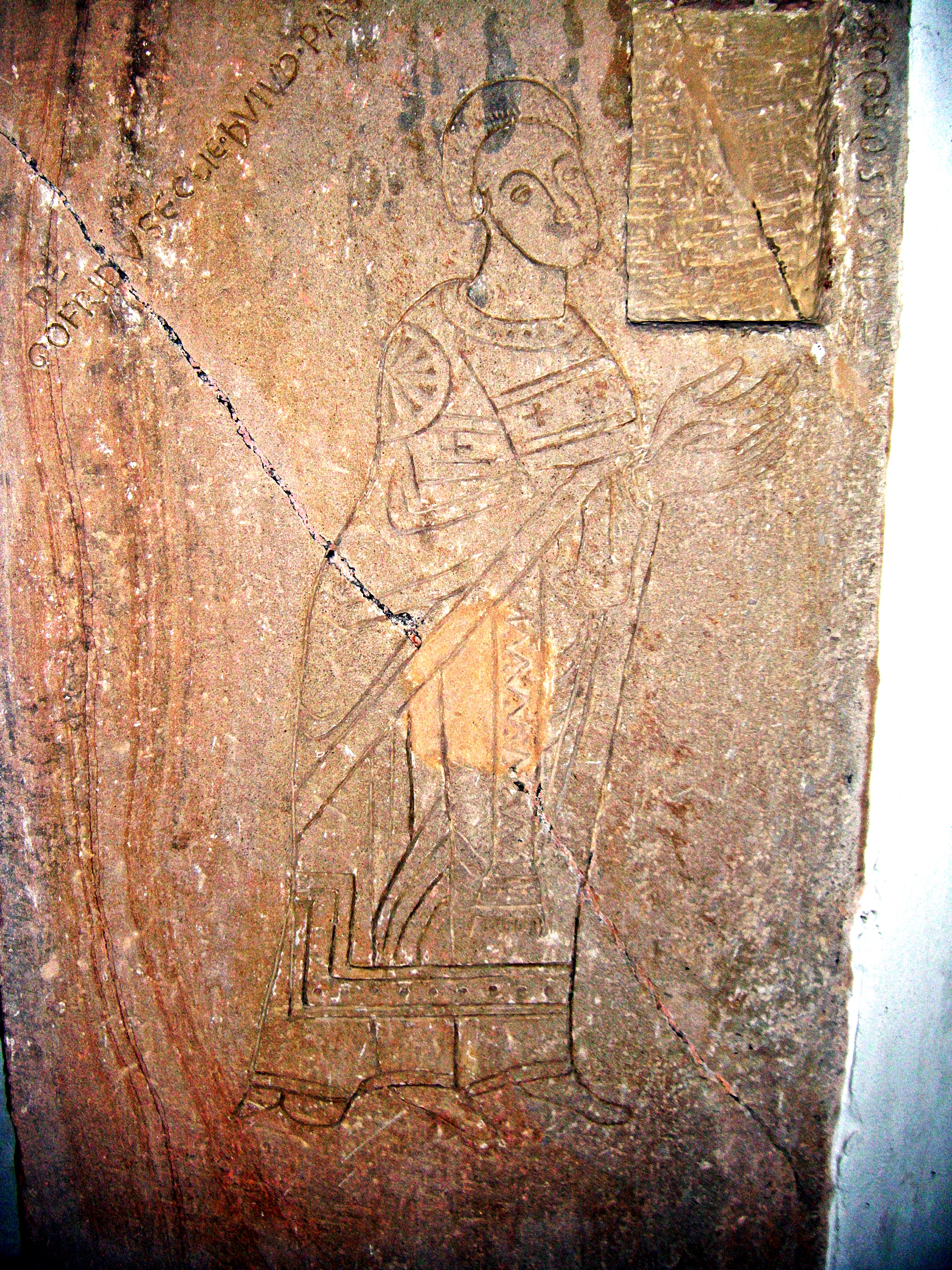 Bubenheim (Pfalz) St. Peterskirche, Relief des Priesters Gottfried von Beselich, 1163